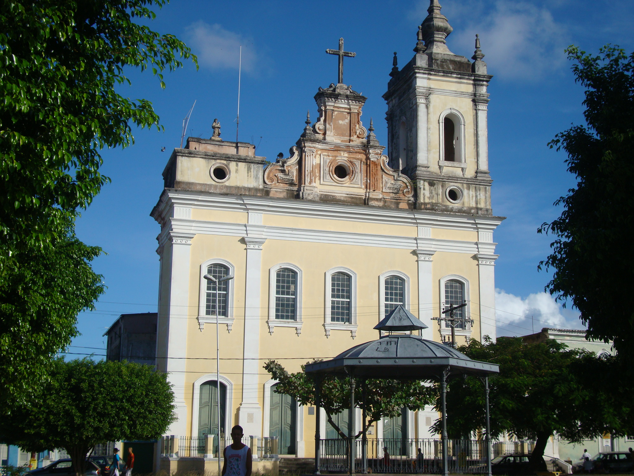 Paróquia de Santo Antônio Além do Carmo, Salvador, Bahia, Brasil.